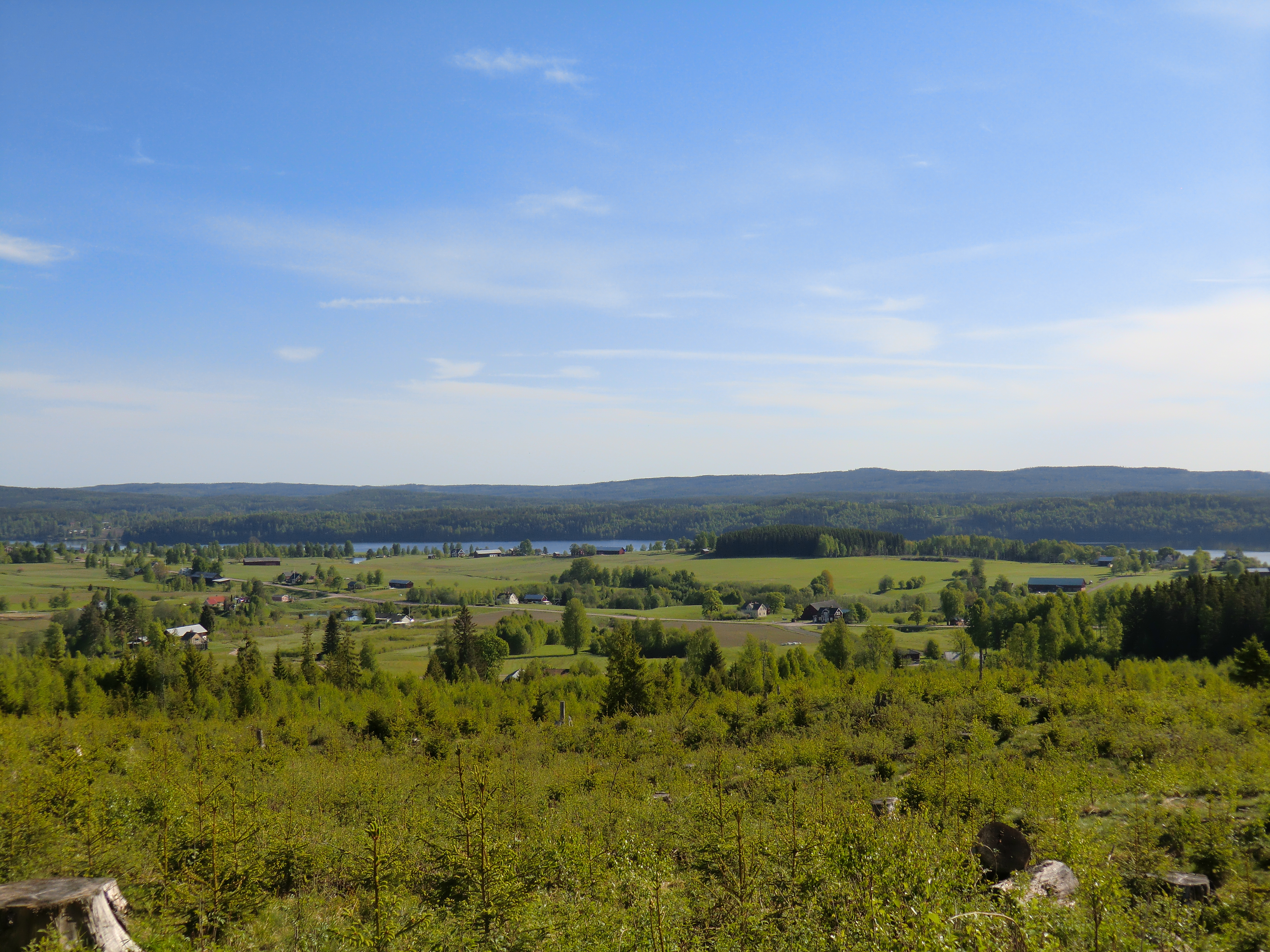 Vy över Västerrottna från vägen till Mangskog.